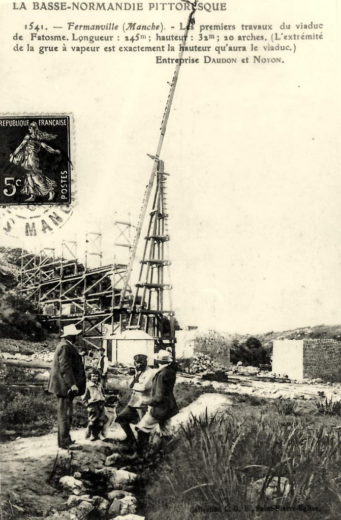 Construction du viaduc de Fermanville, Normandie, France.